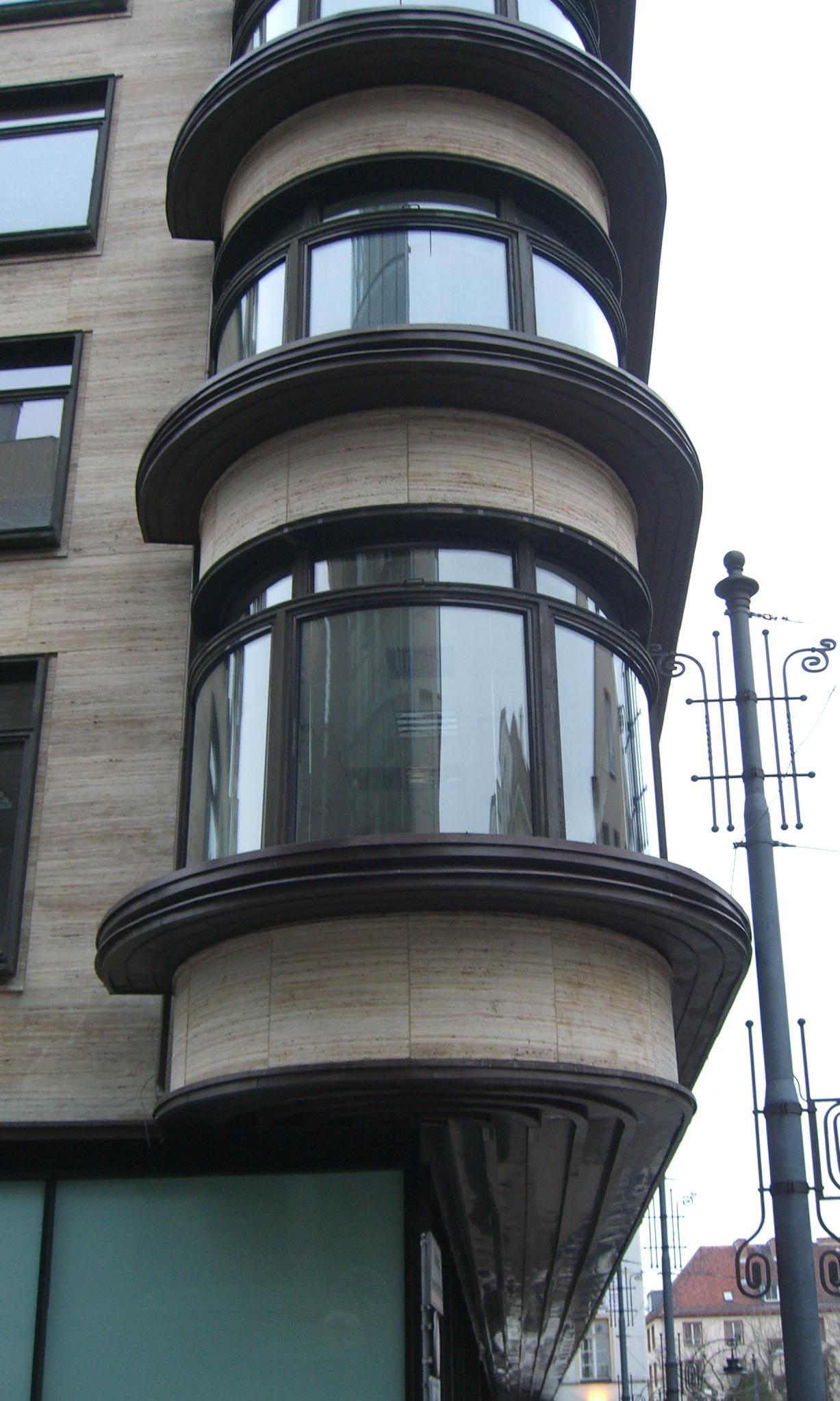 Wroclaw - Mendelsohn Geschäfstgebäude-2012 - Detail